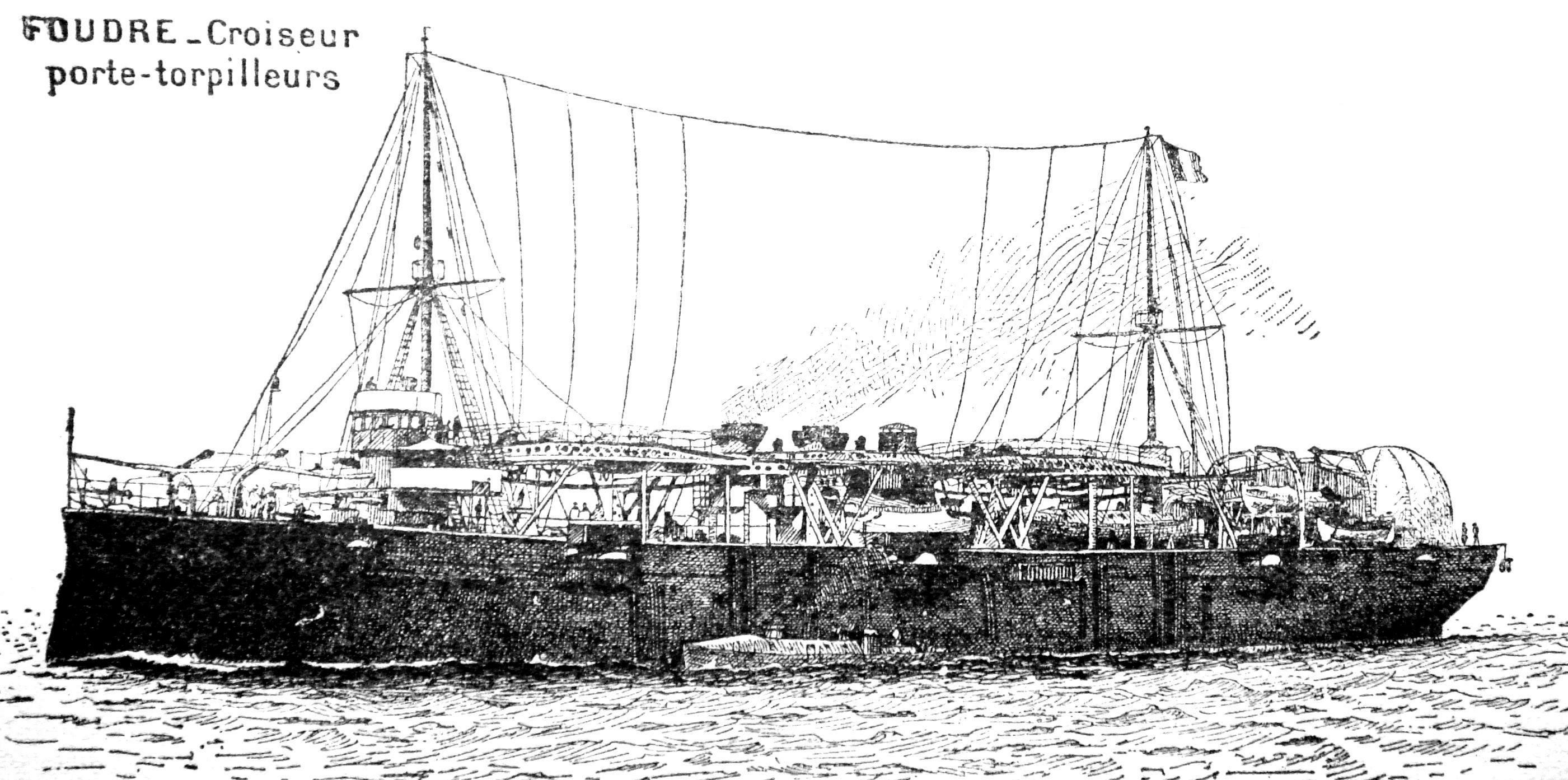 Torpedoe_boat_tender_Foudre